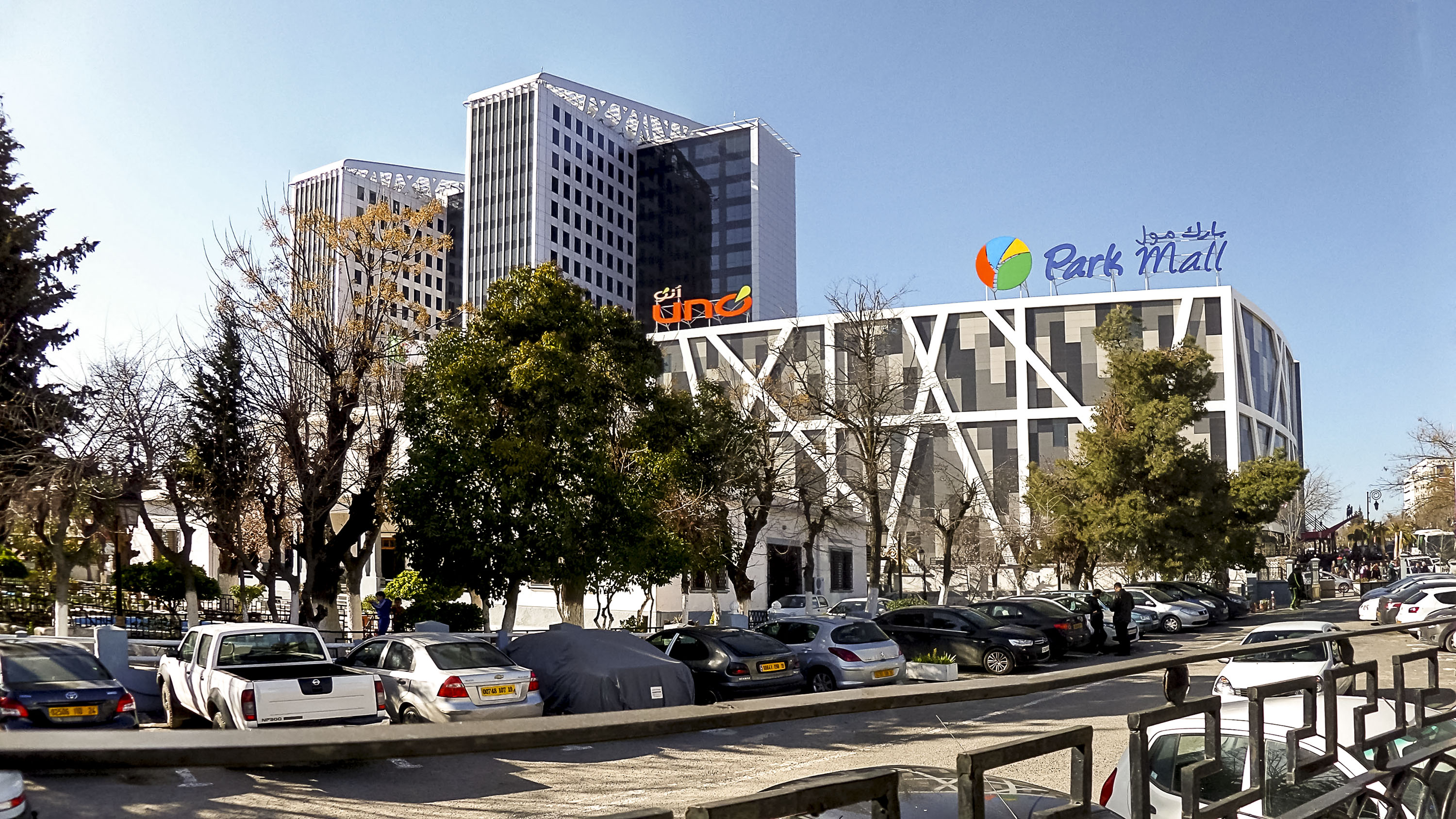 Setif - Park Mall سطيف - بارك مول Setif - Park Mall سطيف - بارك مول